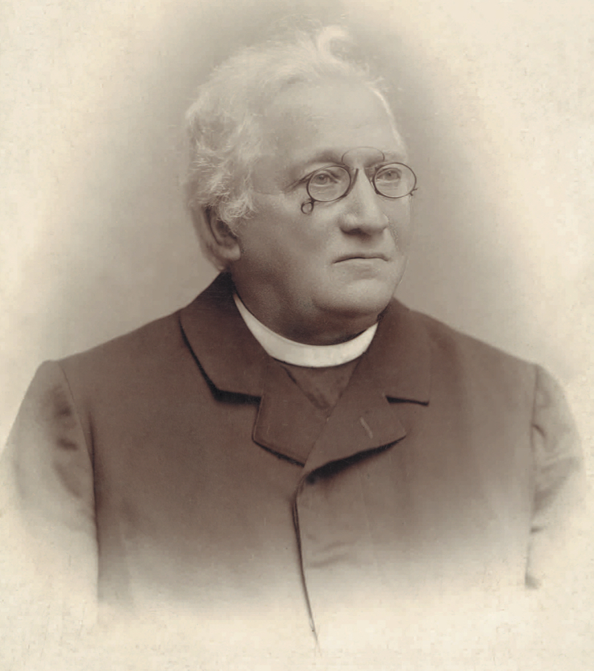 P. Petr Kopal kolem přelomu 20. století